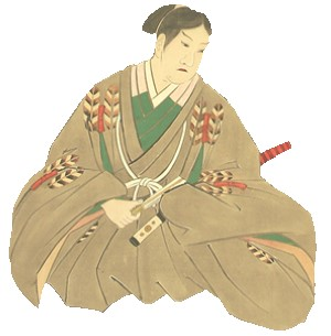 菊池時隆の肖像。